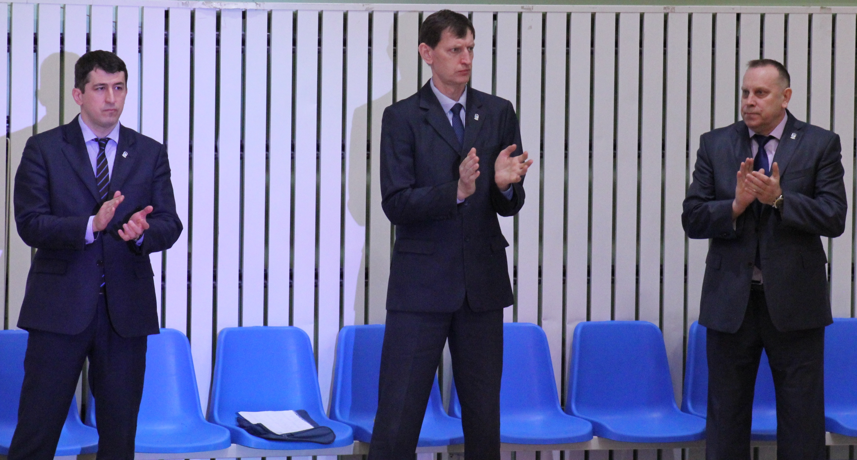 Тренерский штаб команды Купол-Родники. Слева направо: Главный тренер — Милош Павичевич, тренеры — Сергей Швыдкый и Валерий Конотопов.